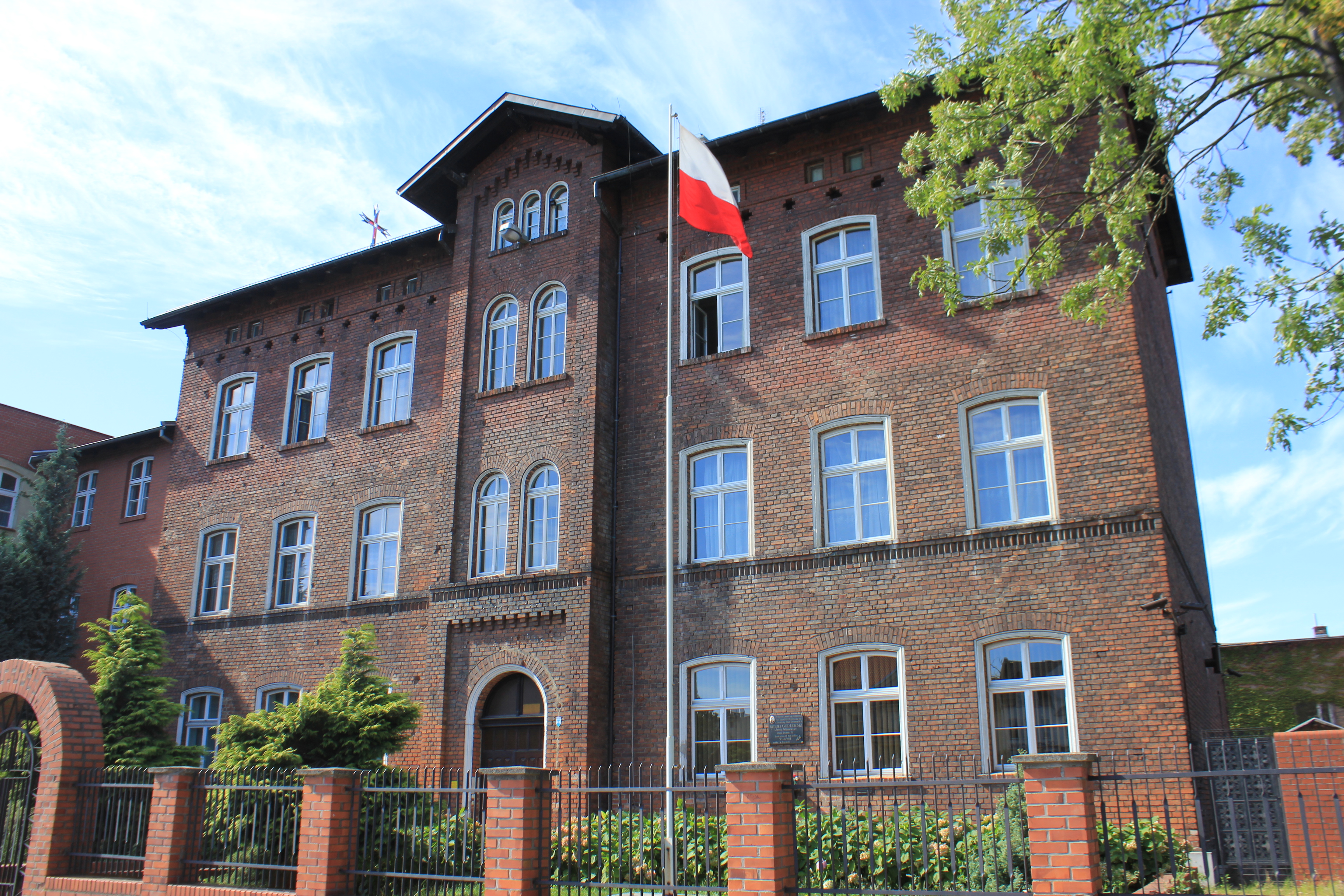 Elbląg, ul. Bożego Ciała 10 - budynek dawnej szkoły katolickiej pw. św. Mikołaja, obecnie Wyższe Seminarium Duchowe, 1910